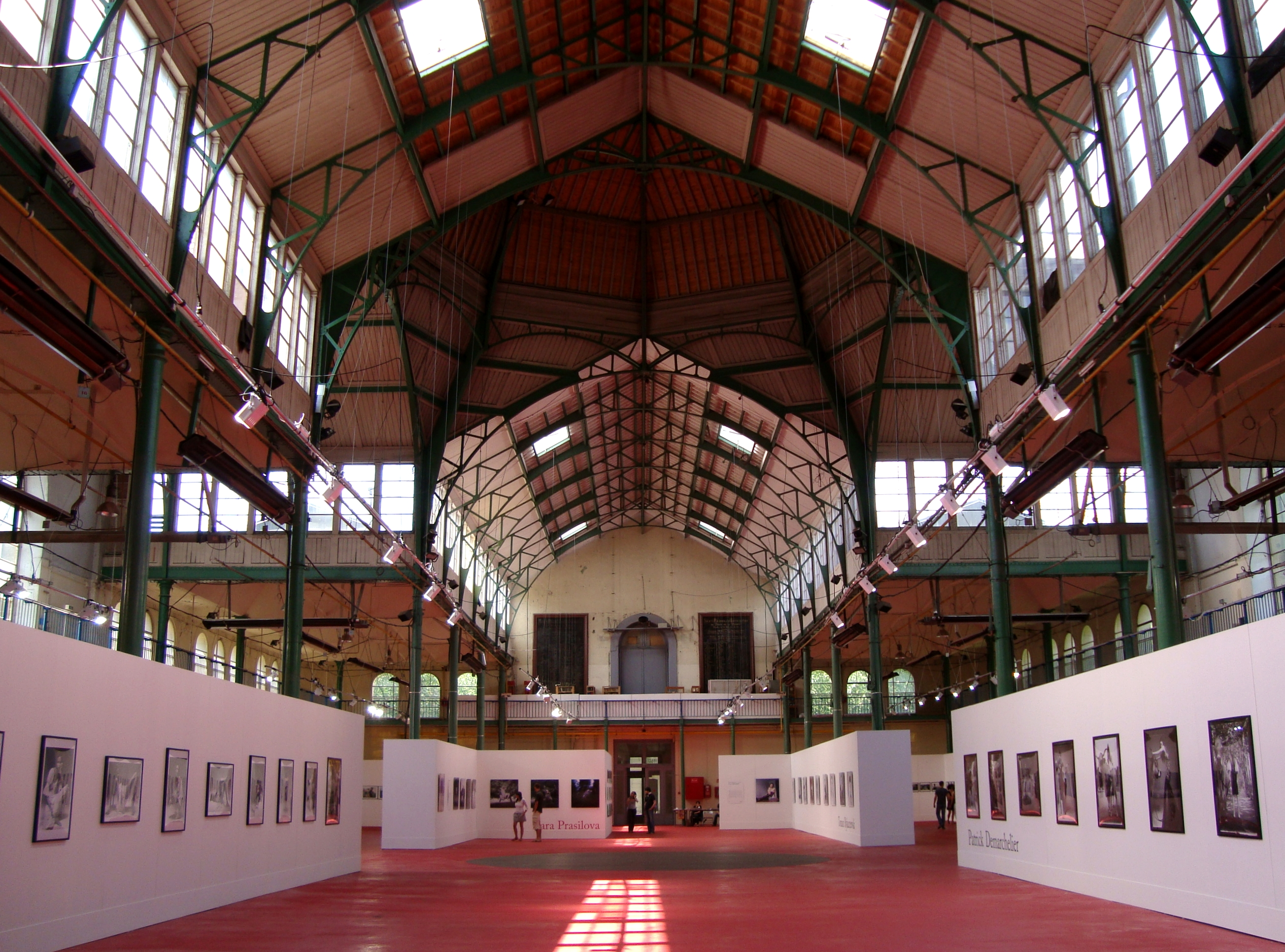 L'intérieur du Palais Rameau à Lille (Nord) lors du festival des transphotographiques.